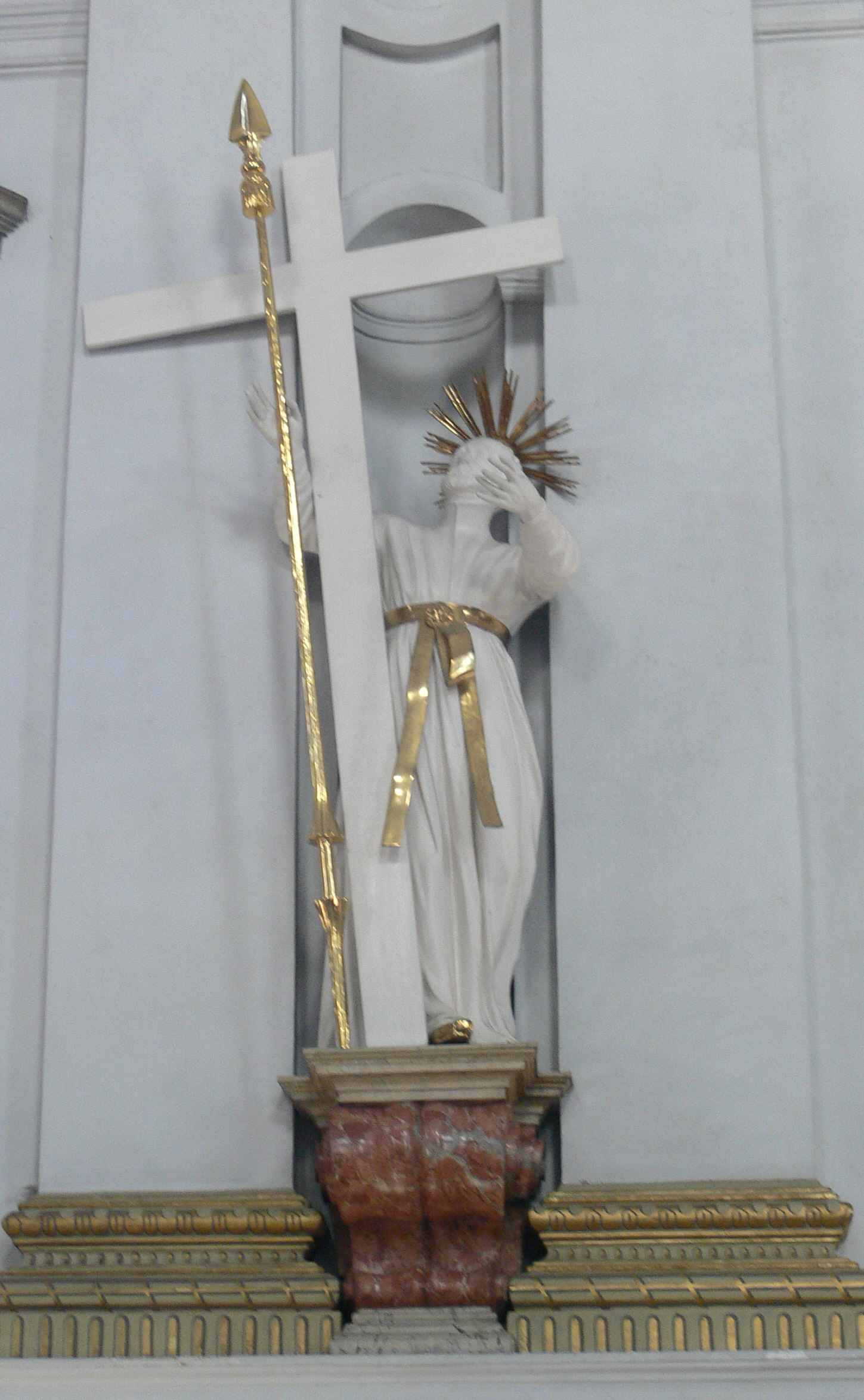 Pfarrkirche St. Martin, Bamberg Figur "Paul Miki" von Johannes Bitterich